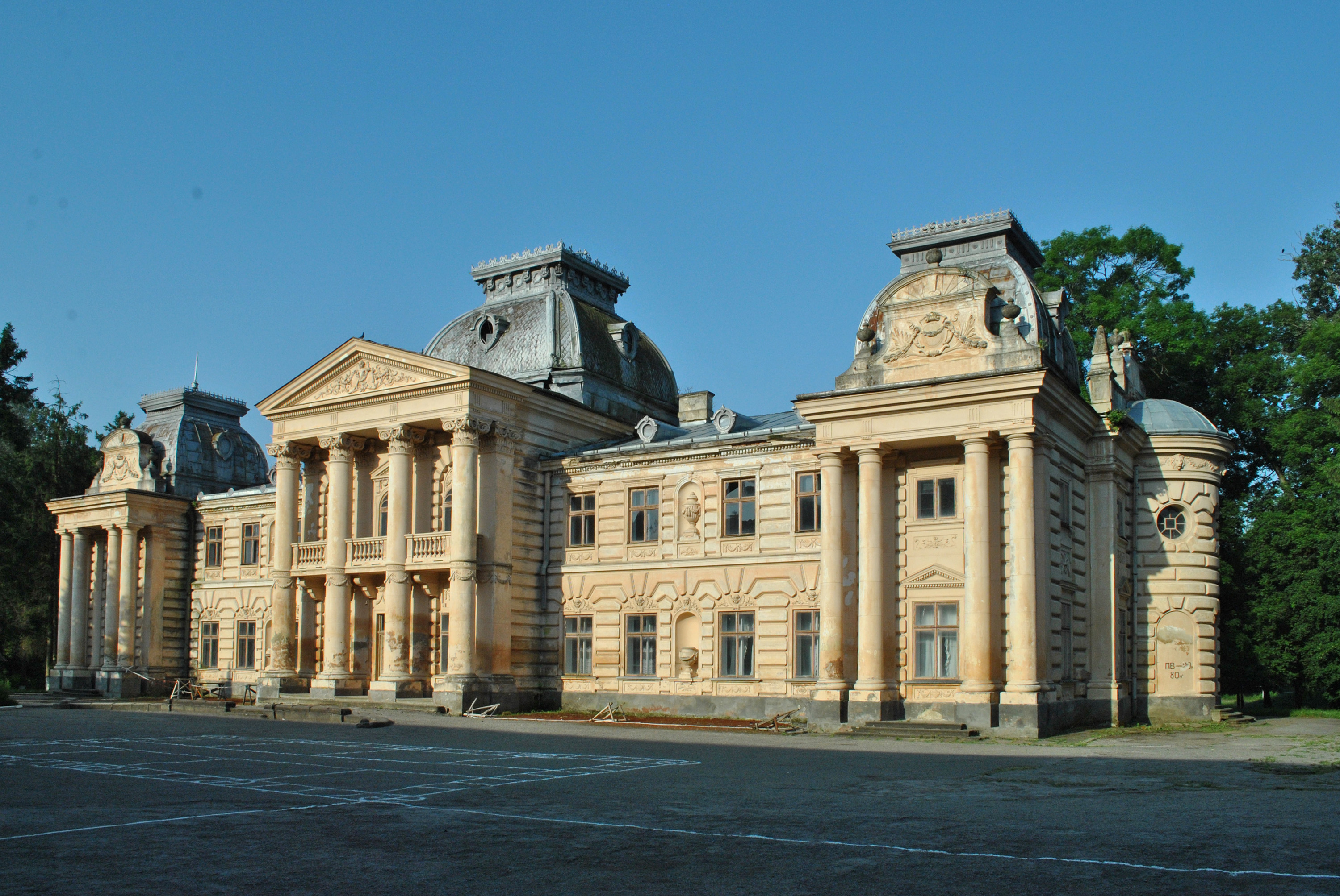 Палац Бадені (мур.) у смт Коропець Монастириського району Тернопільської області.